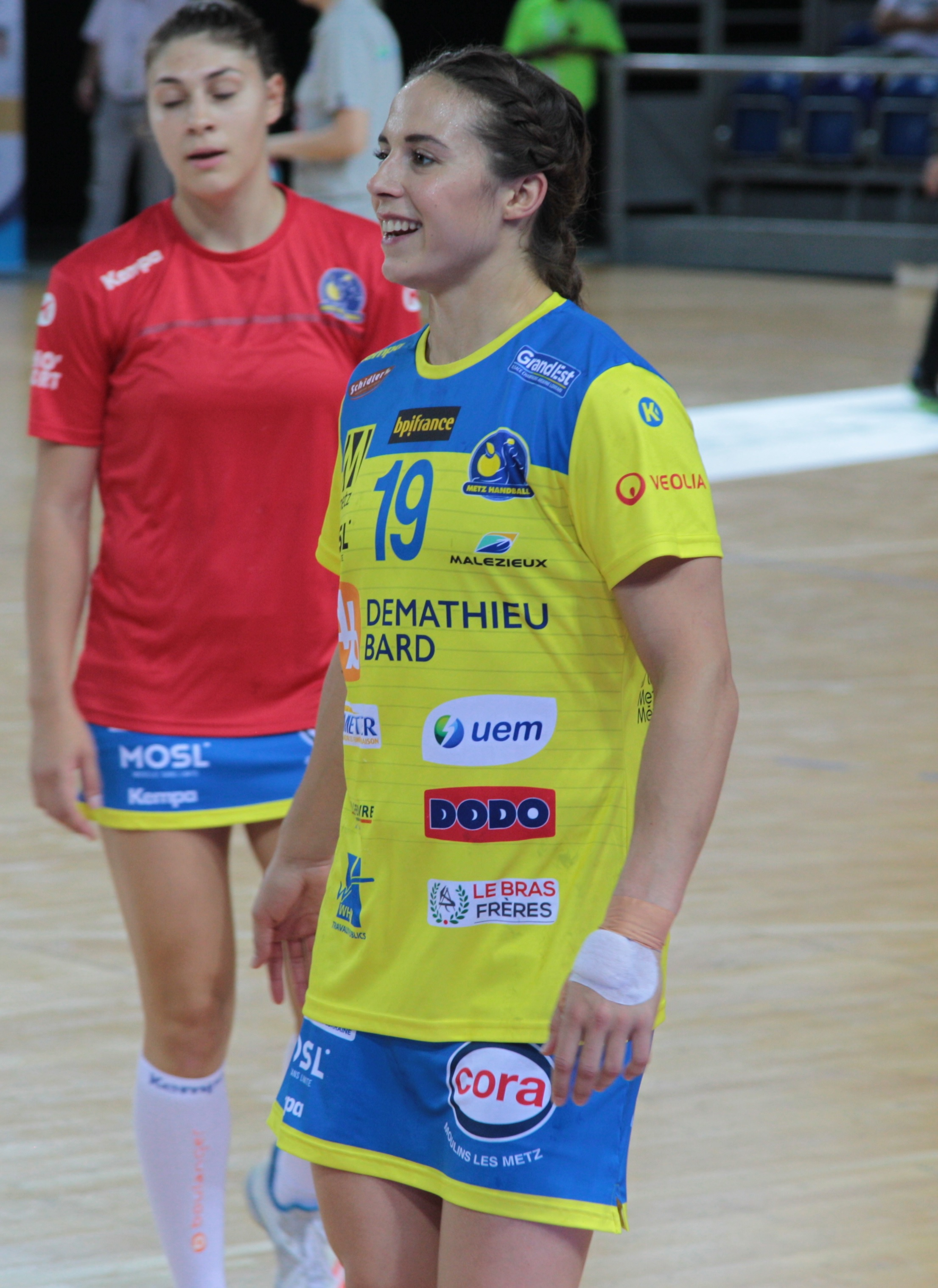 Louise Burgaard (maillot 19), internationale danoise évoluant au club de Metz Handball